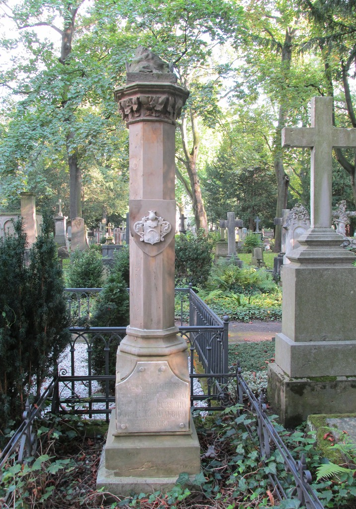 Памятник Аркадию Николаевичу Алферову (1814-1872) на Старом кладбище в Бонне, воздвигнутый его братом. Фото 2014, сентябрь. Бонн, Старое кладбище